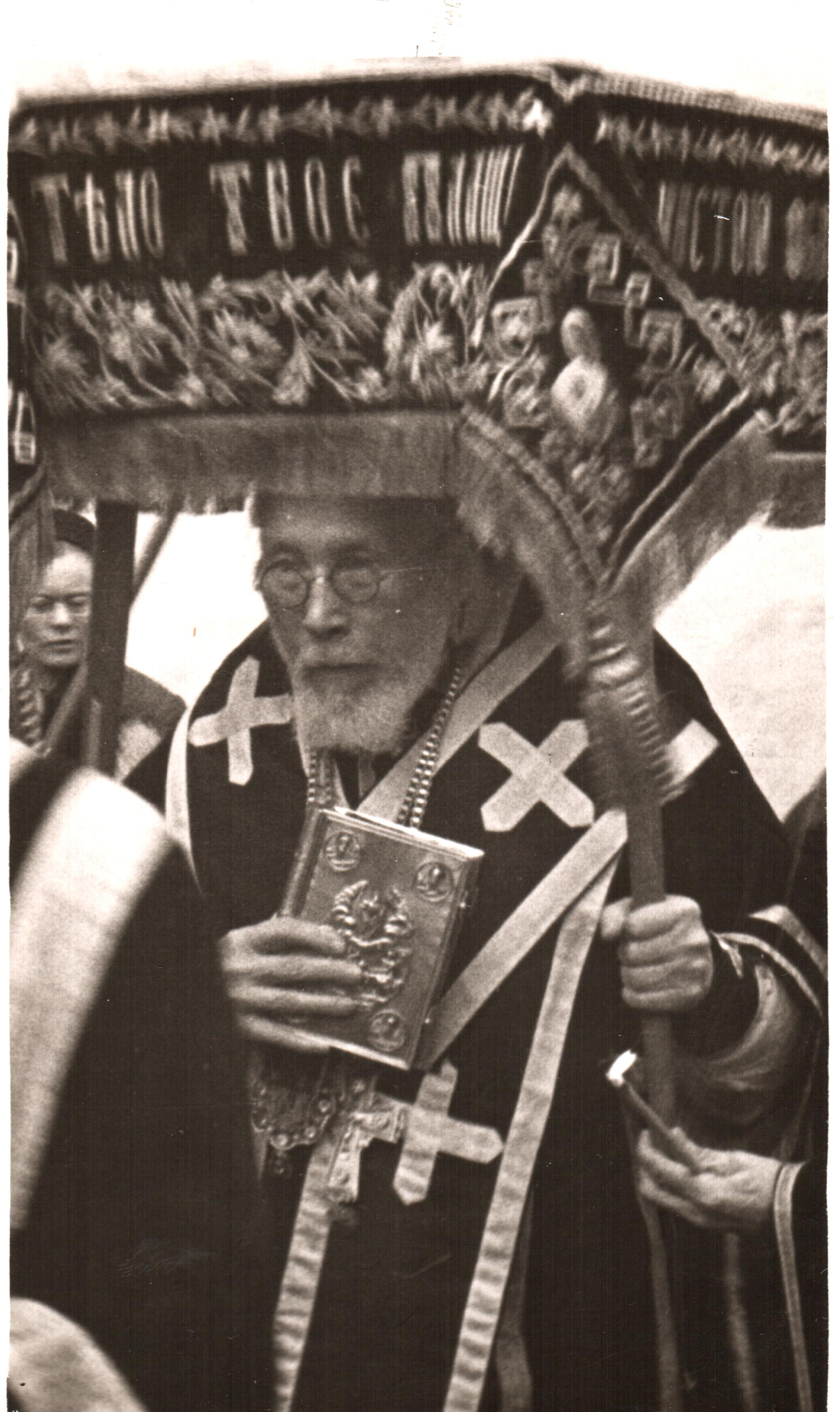 Ülempiiskop Nikolai Leismann. Petseris 1938